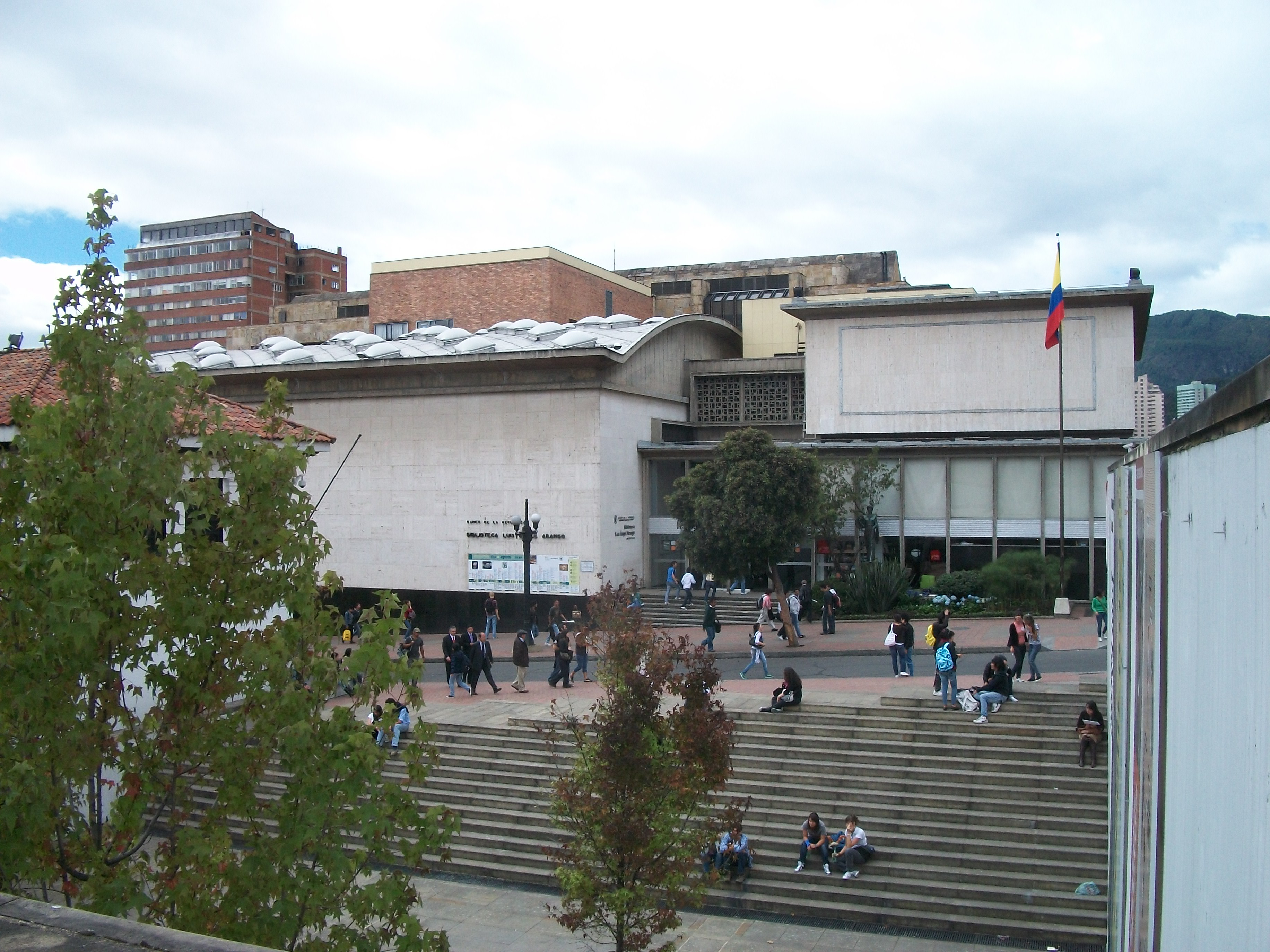 Biblioteca Luis Angel Arango desde el Museo Botero.